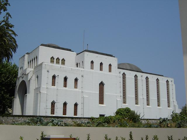 Synagogue à Porto. Mirandés: Sinagoga na cidade de l Porto, Pertual.